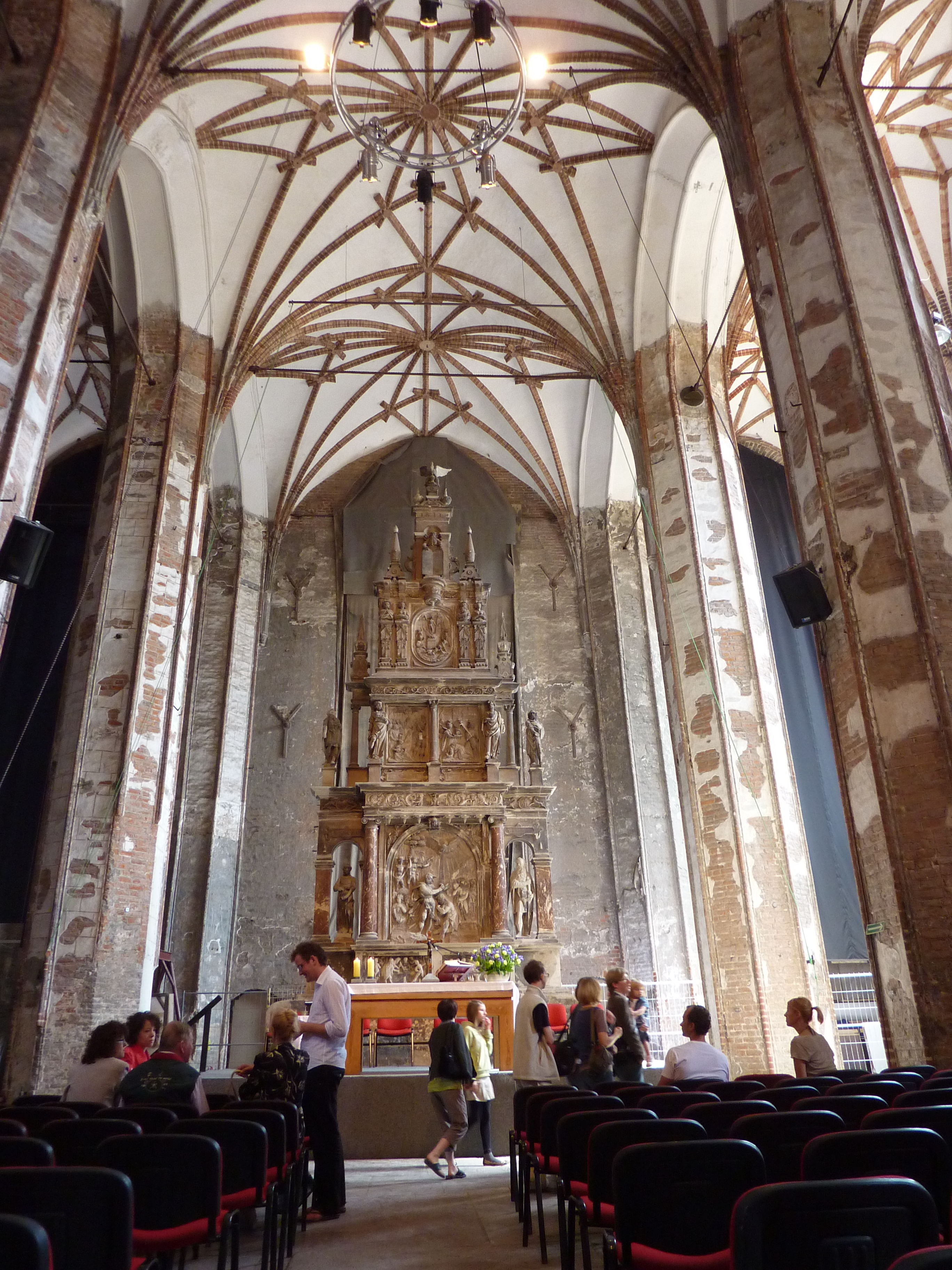 Kamienny ołtarz kościoła św. Jana w Gdańsku